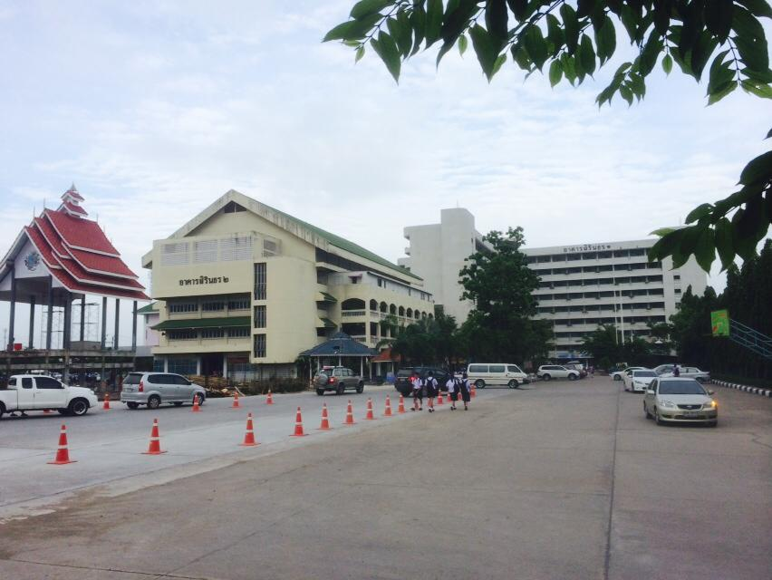 ลานเอนกประสงค์ โรงเรียนสวนกุหลาบวิทยาลัย รังสิต